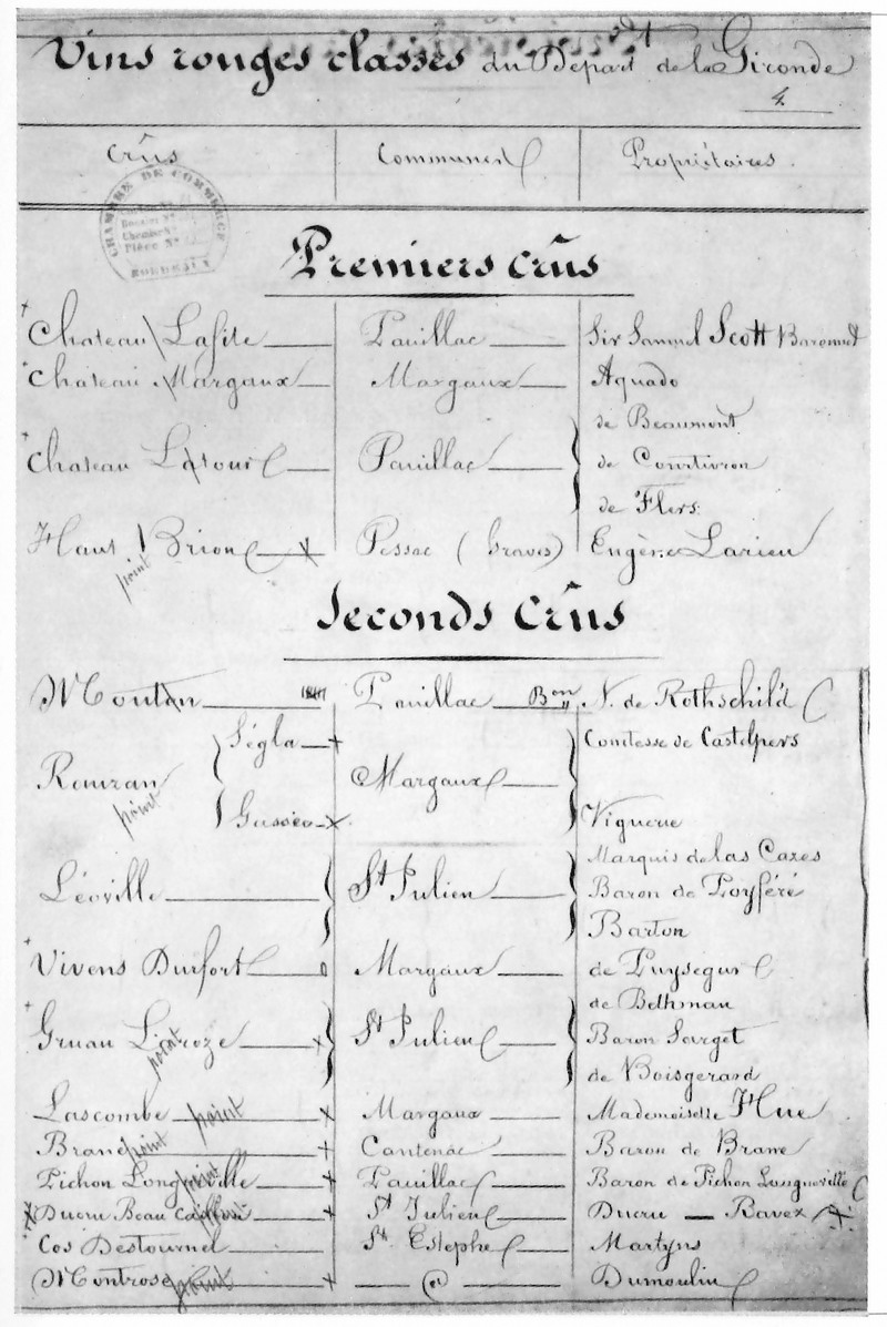 Classification officielle des vins de Bordeaux de 1855 établie à l'occasion de l'exposition universelle de Paris de 1855 à la demande de Napoléon III (3ème page)